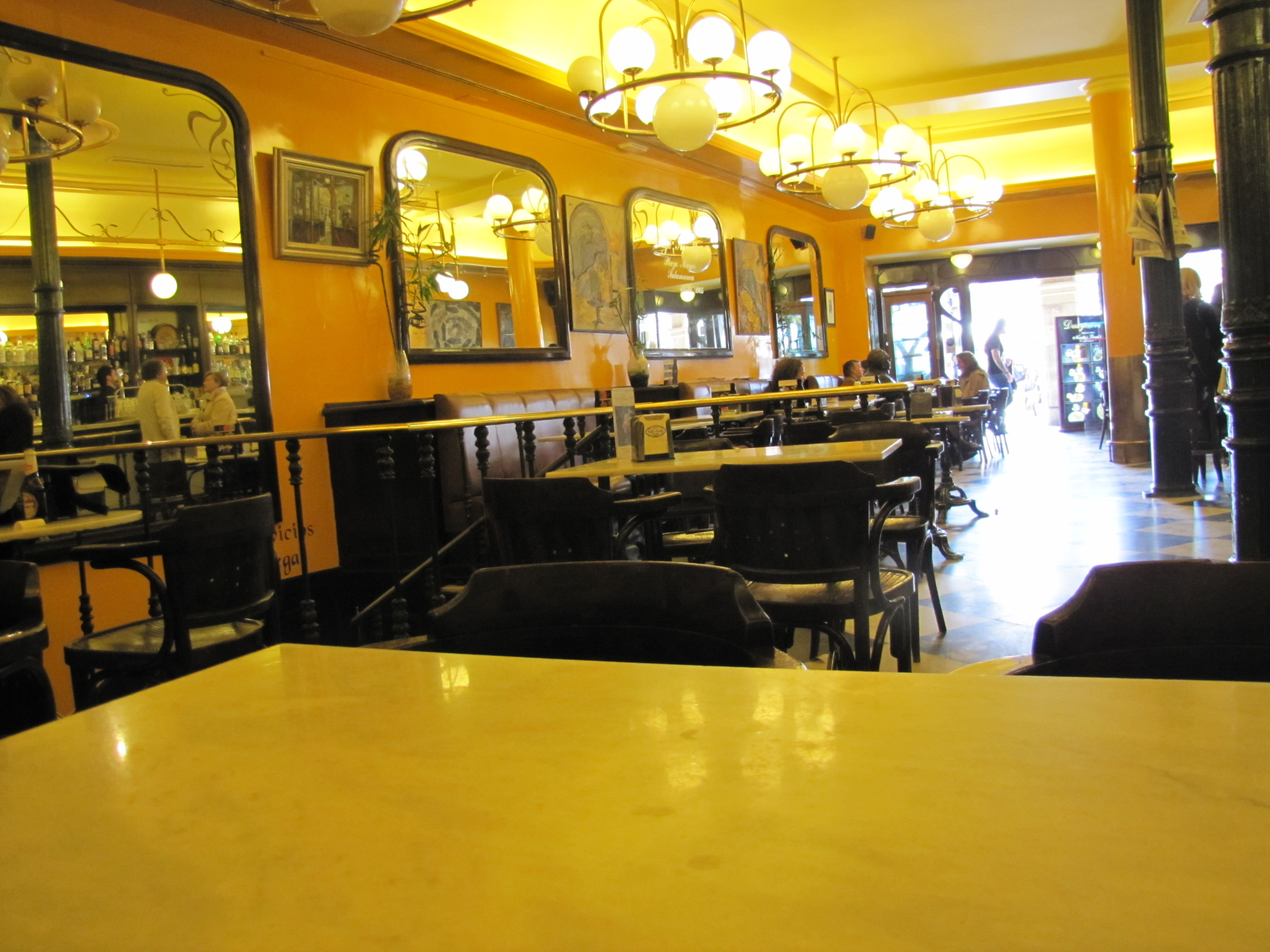 Café Literario Novelty en la Plaza Mayor de Salamanca. El decano de los cafés de Salamanca, fundado en 1905. Y lugar habitual de reunión de literatos y artistas en la ciudad, como Torrente Ballester, el escultor Fernando Mayoral o el director de la RAE, Víctor García de la Concha entre otros.